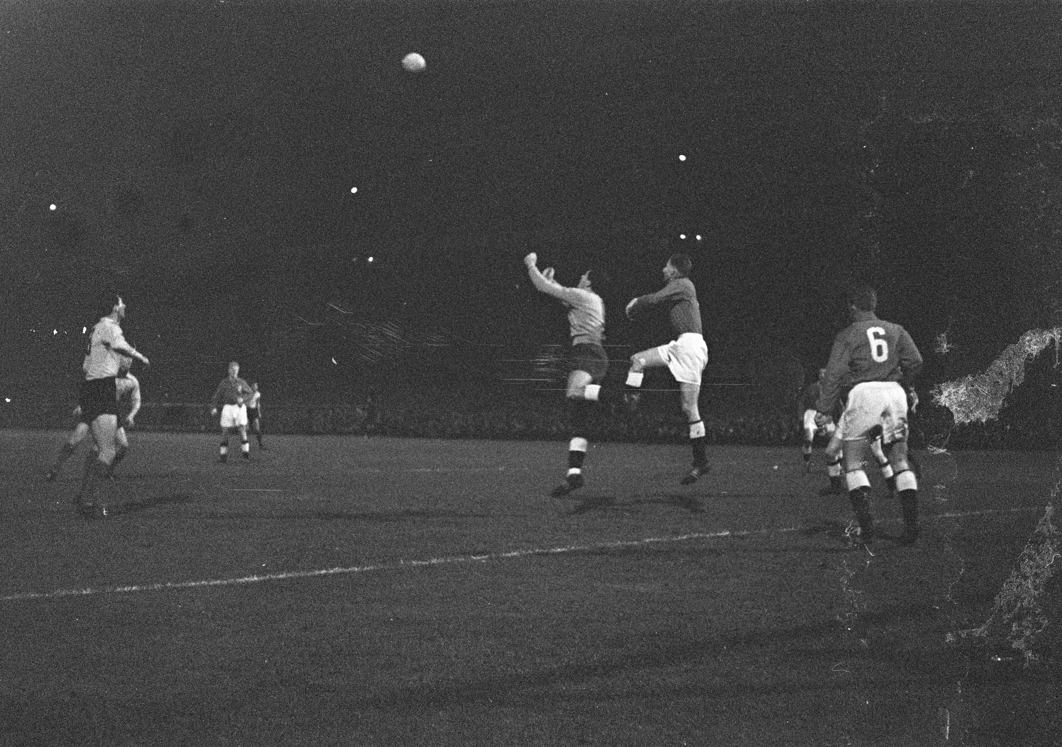 Collectie / Archief : Fotocollectie Anefo Reportage / Serie : [ onbekend ] Beschrijving : Nederland tegen Noorwegen 7-1, v.l.n.r. Rijvers, Van de Kuil , Van de Hart , Notermans , Van de Linden en Wilkes Datum : 4 november 1959 Trefwoorden : sport, voetbal Persoonsnaam : Kuil, Piet van der, Notermans, Jan, Rijvers, Kees, Wilkes, Faas Fotograaf : Pot, Harry / Anefo Auteursrechthebbende : Nationaal Archief Materiaalsoort : Negatief (zwart/wit) Nummer archiefinventaris : bekijk toegang 2.24.01.05 Bestanddeelnummer : 910-8002